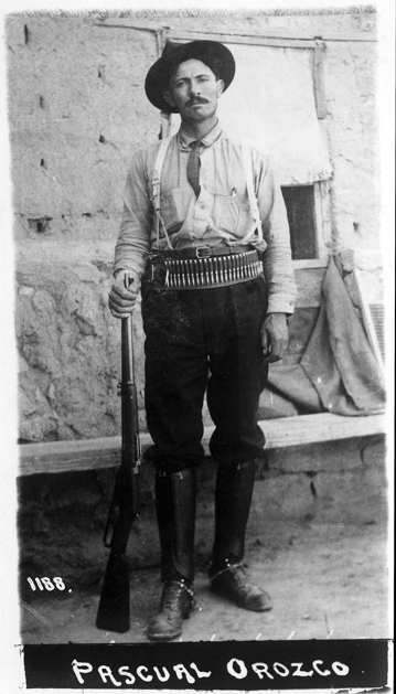 General Pascual Orozco; hijo.